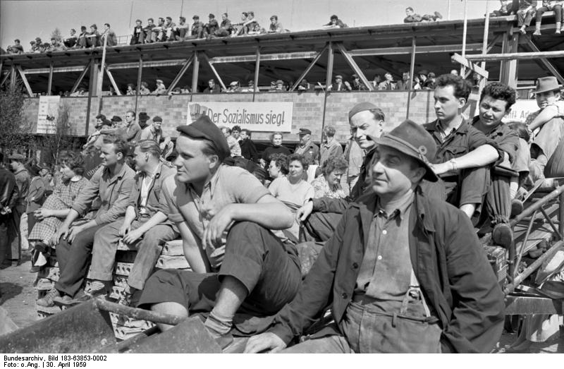 Kombinat Schwarze Pumpe, Probebetrieb beginnt Zentralbild/Weiß 30.4.1959 Erste Briketts und erster Strom aus "Schwarze Pumpe" Vier Wochen vor dem Staatstermin drehte sich am 30.4.1959 zum erstenmal die 25 Megawatt-Turbine im Kombinat "Schwarze Pumpe", verließen die ersten Briketts die mächtigen Vierstrangpressen. Damit begann am Vorabend des 1. Mai der Probebetrieb der ersten Produktionsabteilung des größten Braunkohlenveredelungskombinates der Welt. UBz.: Während des Meetings der Erbauer.